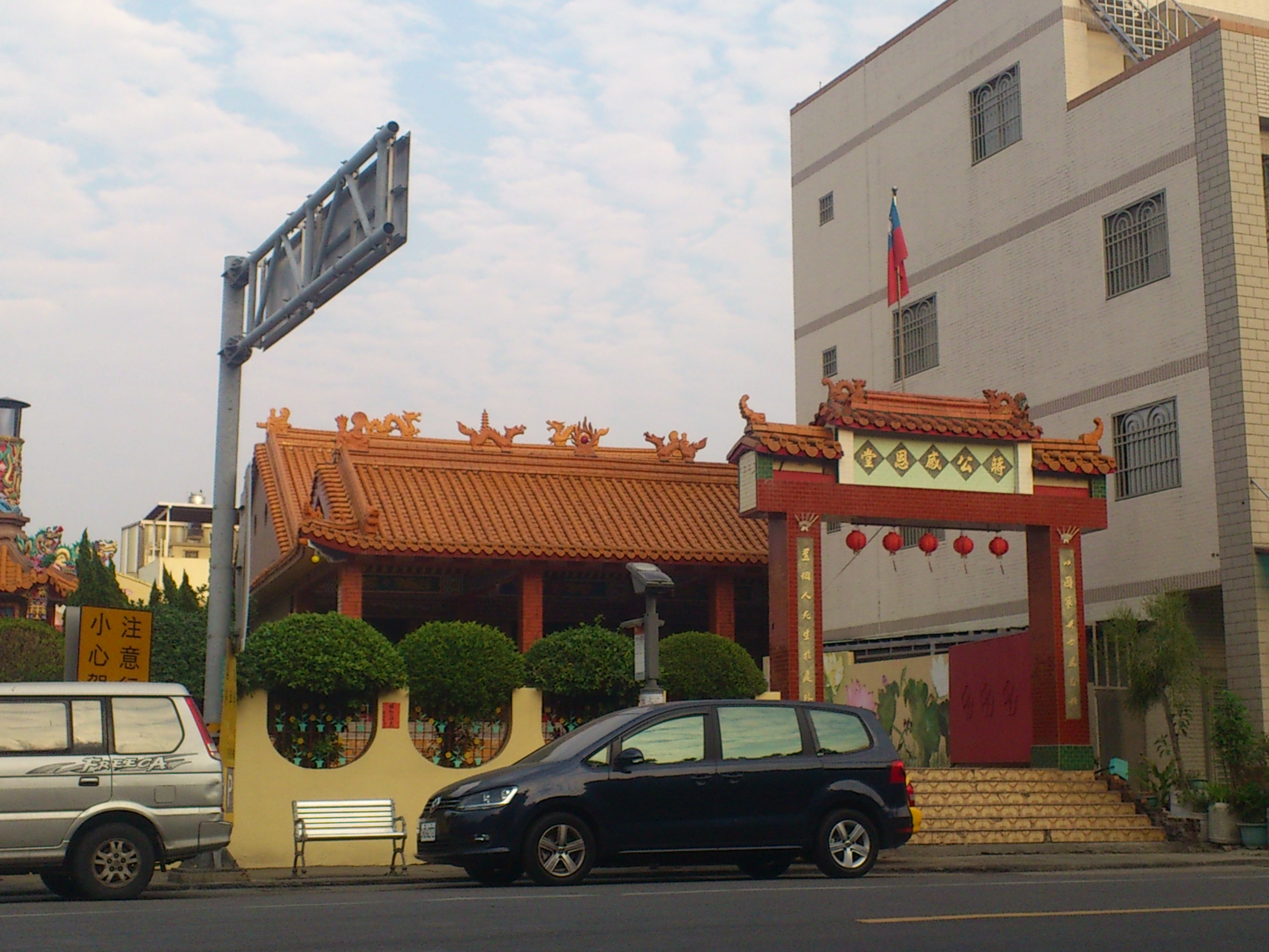 旗津蔣公感恩堂